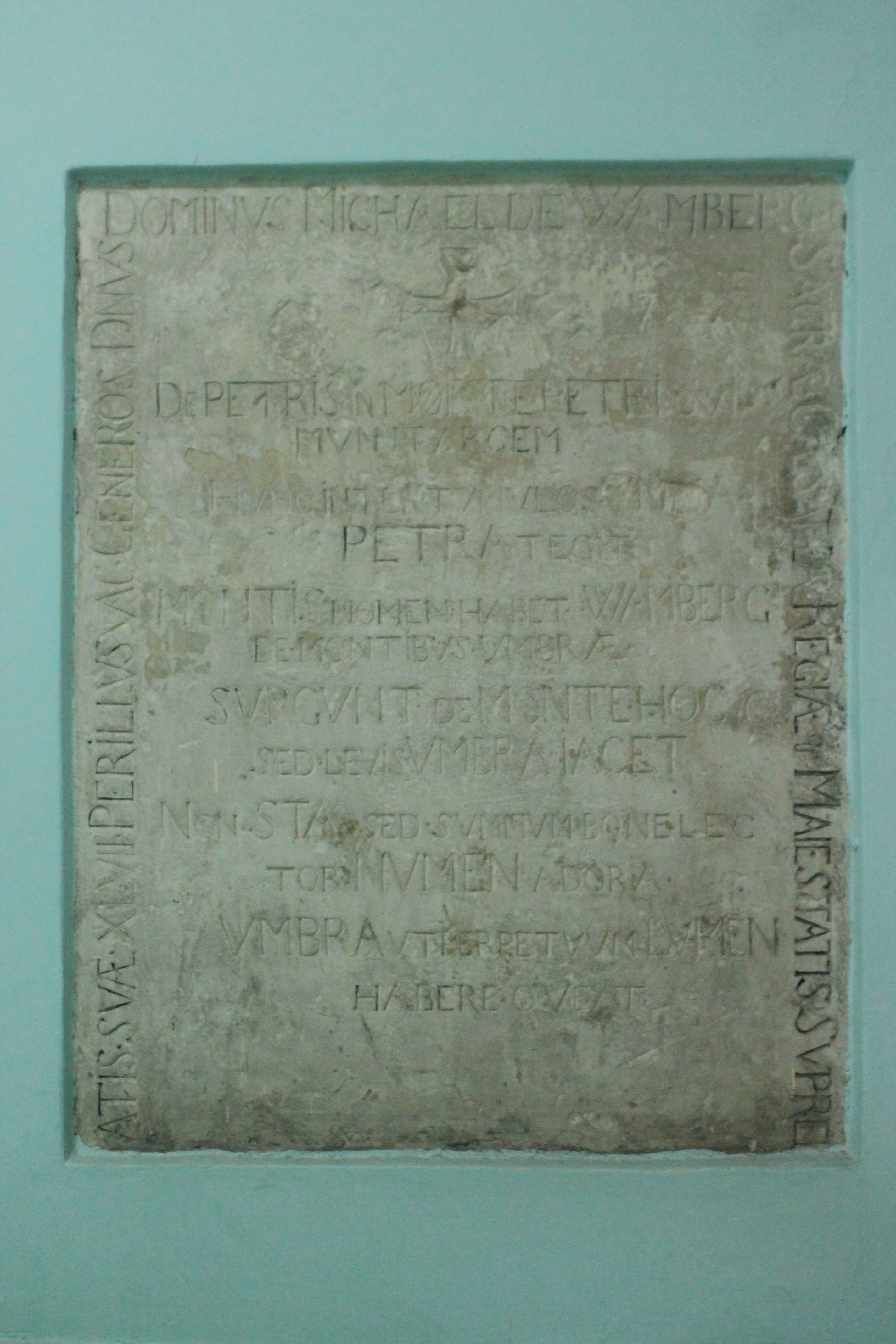 Vojna bolnica Petrovaradin